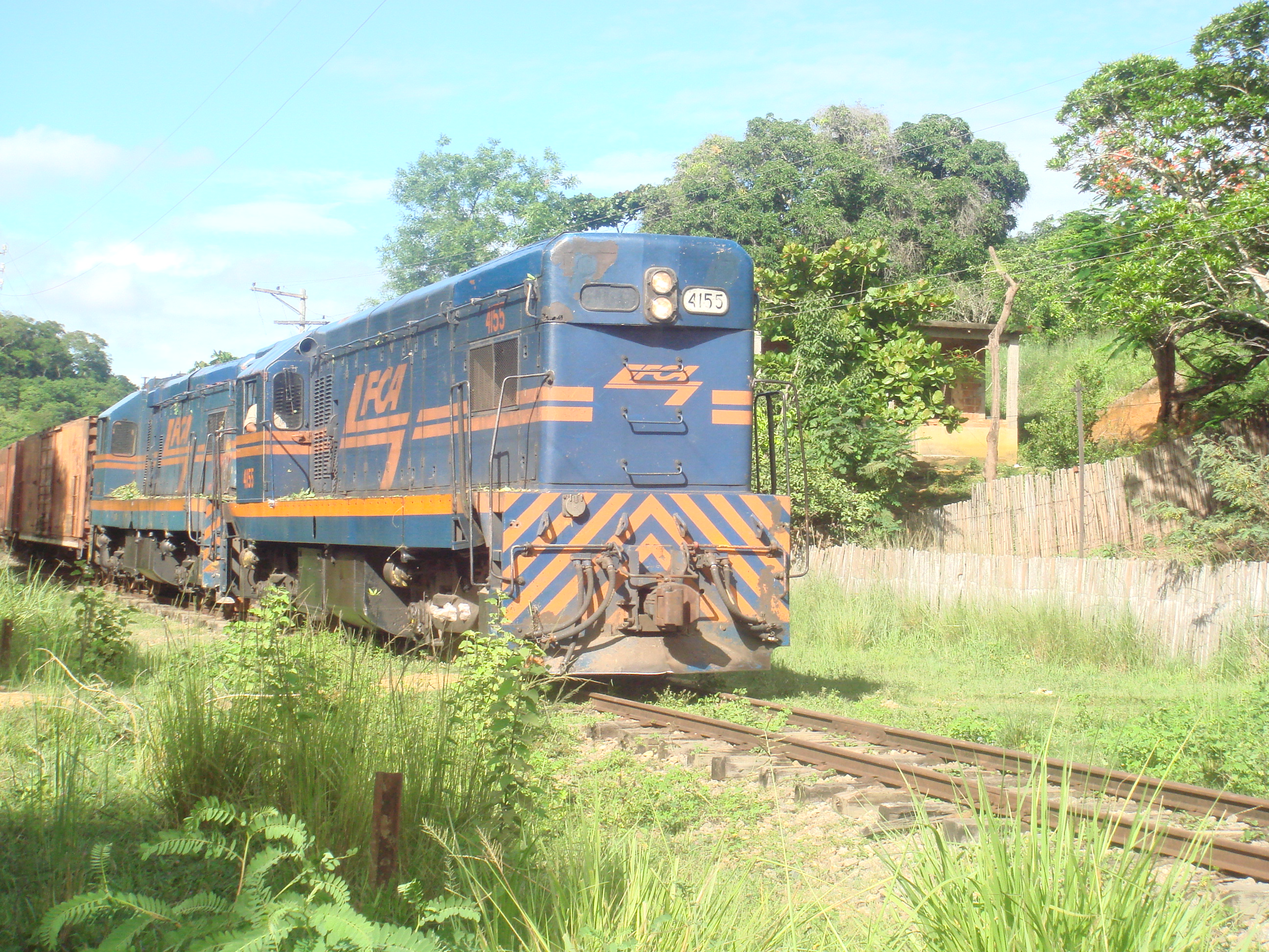 Comboio da Ferrovia Centro-Atlântica S.A. passando pela cidade de tres irmãos, no estado do Rio de janeiro - Brasil. Locomotiva GM G12, original da RMV nº2207, atual FCA nº4155